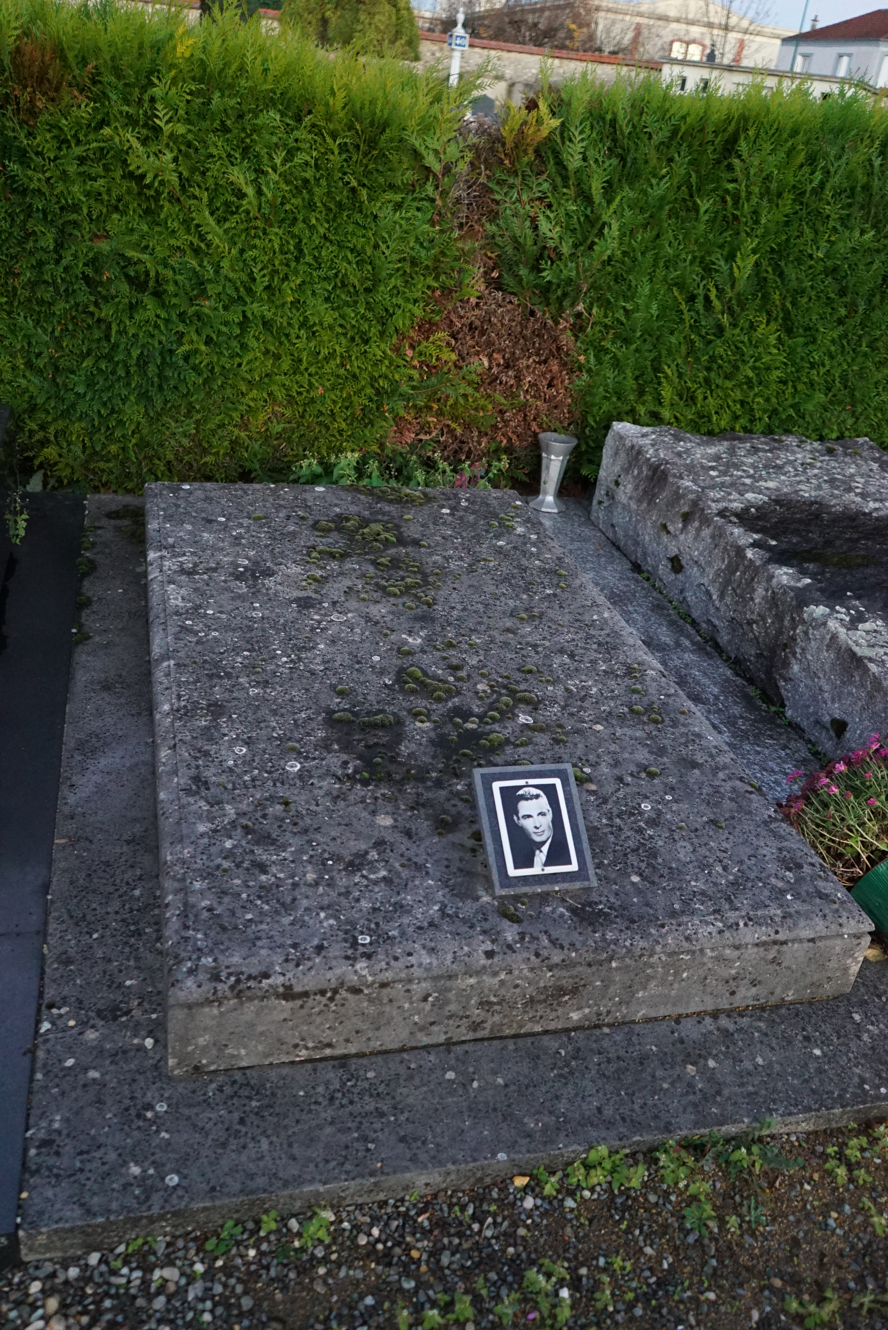 tombeau de blanchette brunoy et son époux.